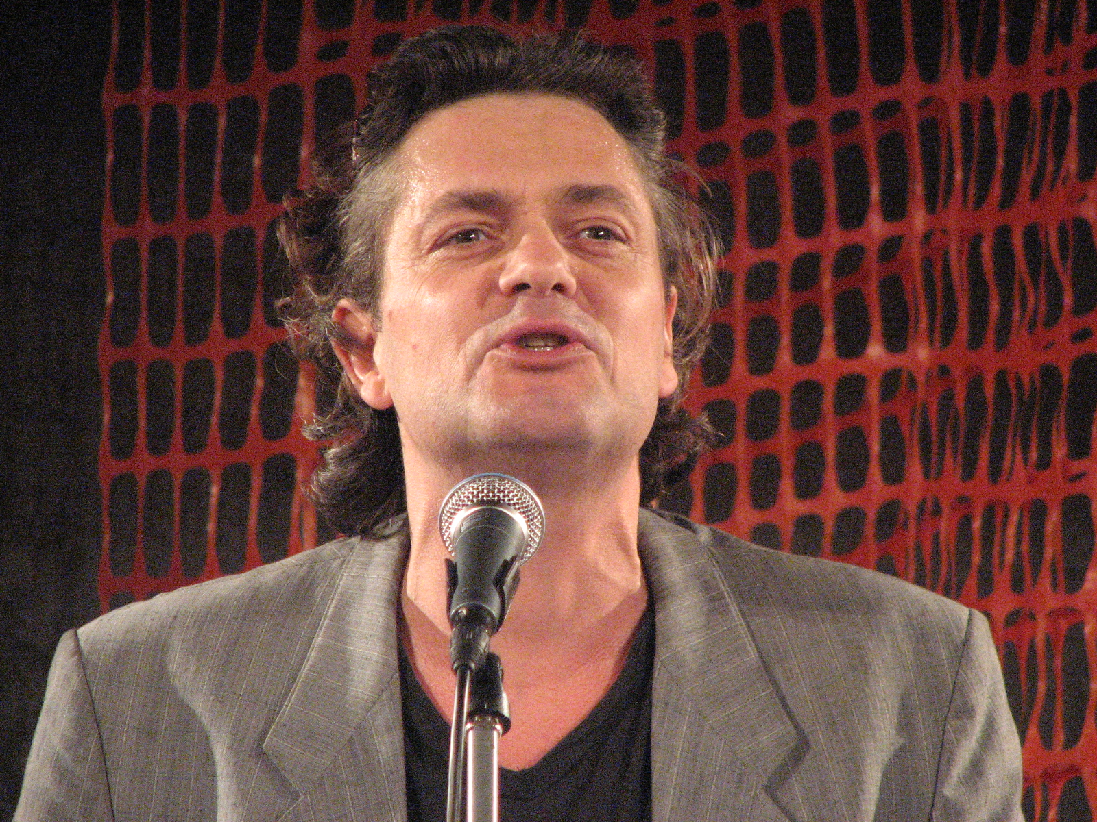 Claus Ankersen esinemas kirjandusfestivalil HeadRead 2011